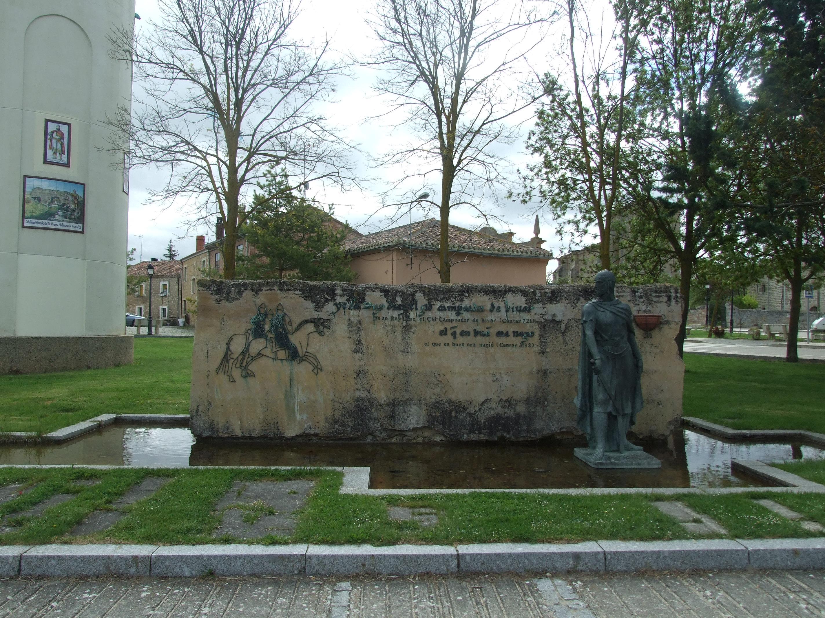 Estatua en el centro de Vivar del Cid